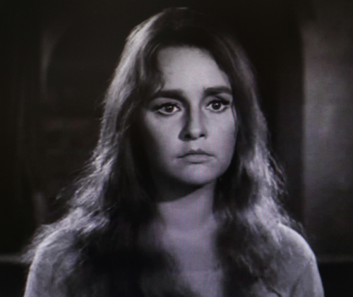 Majda Potokar slovensk filmskådis (1930-2001)